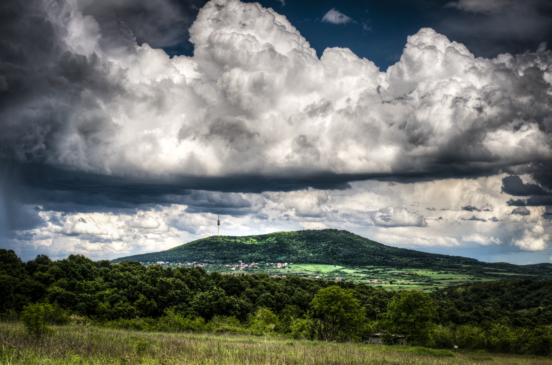 Ово је фотографија заштићеног природног добра у Србији под шифром: ПИО01This is a a photo of a natural area in Serbia with ID: ПИО01